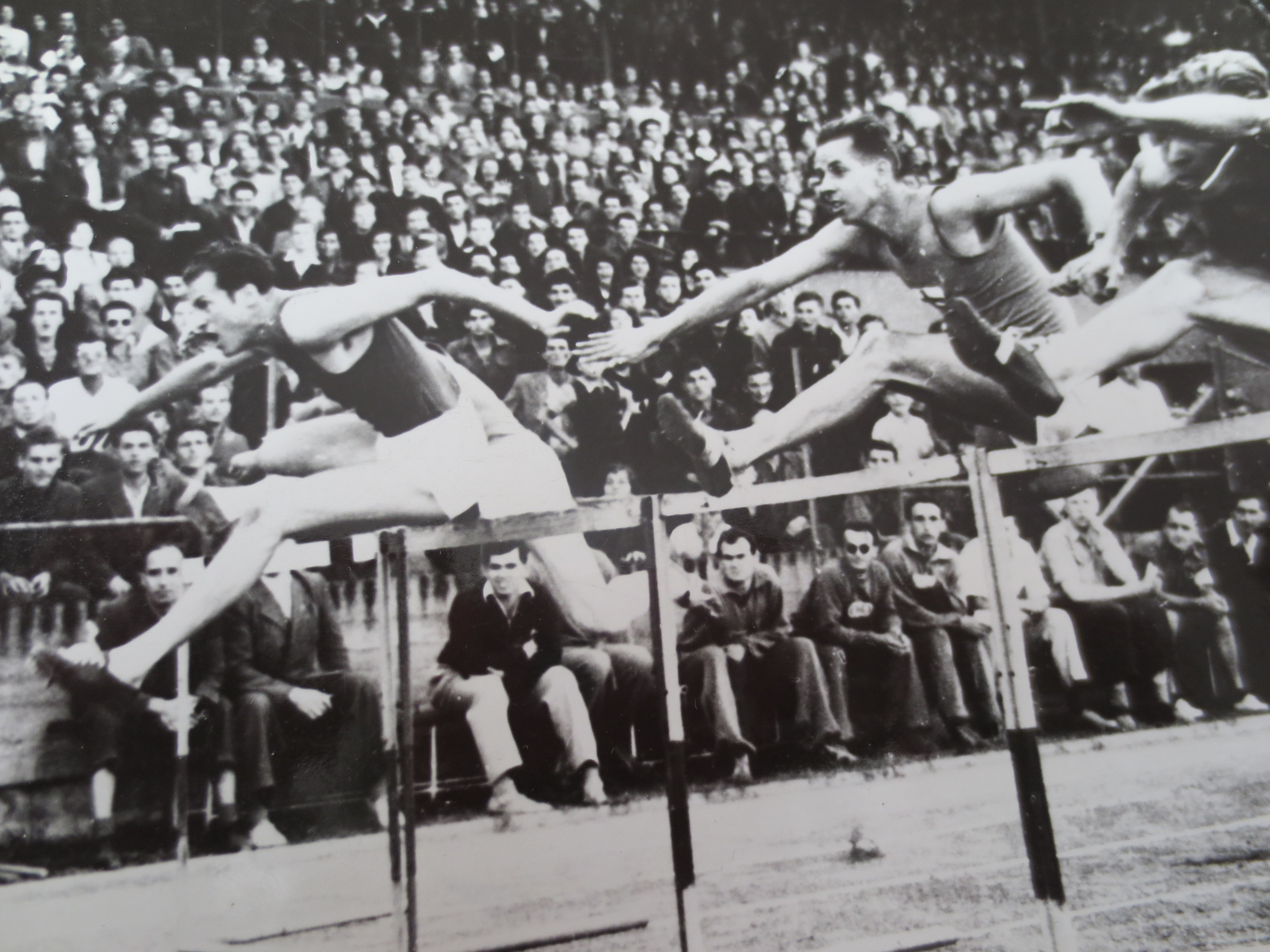 Milan Tošnar (první zleva) vítězí na 110 m př. v mezistátním utkání ČSR-Finsko